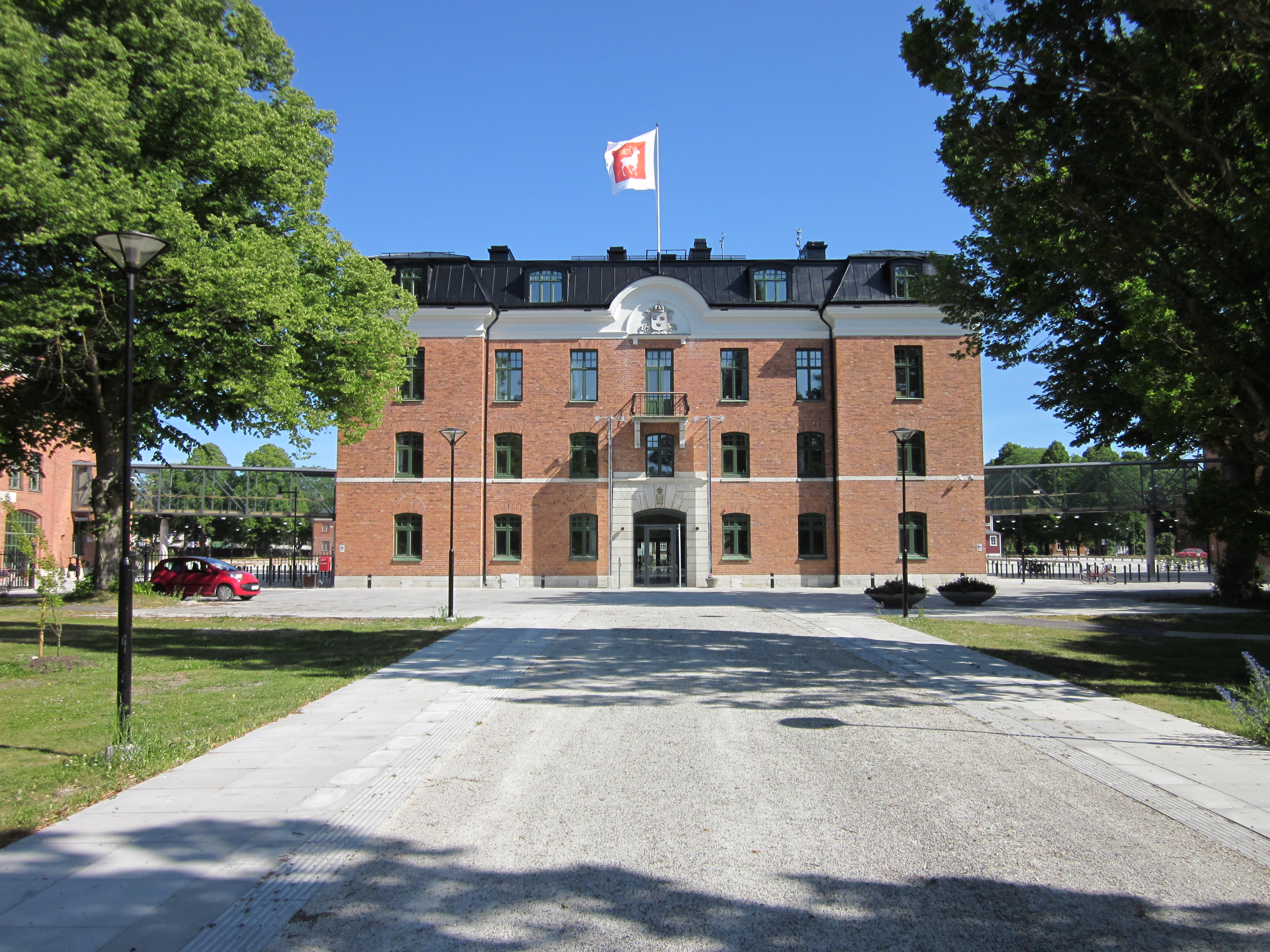 Kanslihuset vid Gotlands regemente, P 18. Kanslihuset är, som övriga byggnader vilka stod färdiga 1905, uppfört efter Erik Josephsons typritningar. Idag (2010) är två glasgångar byggda till kasernerna "Gute" och "Graip".